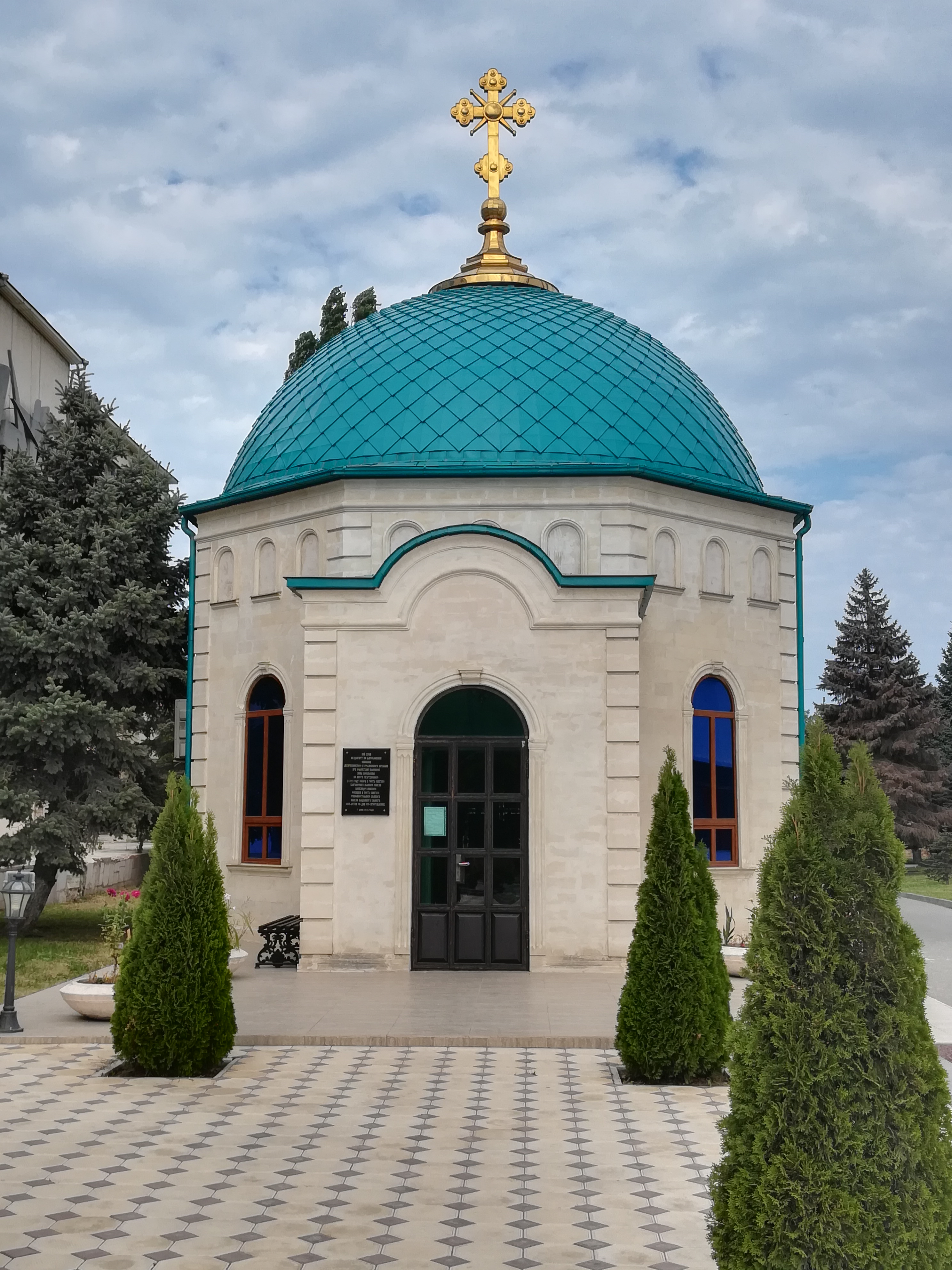 Махачкала